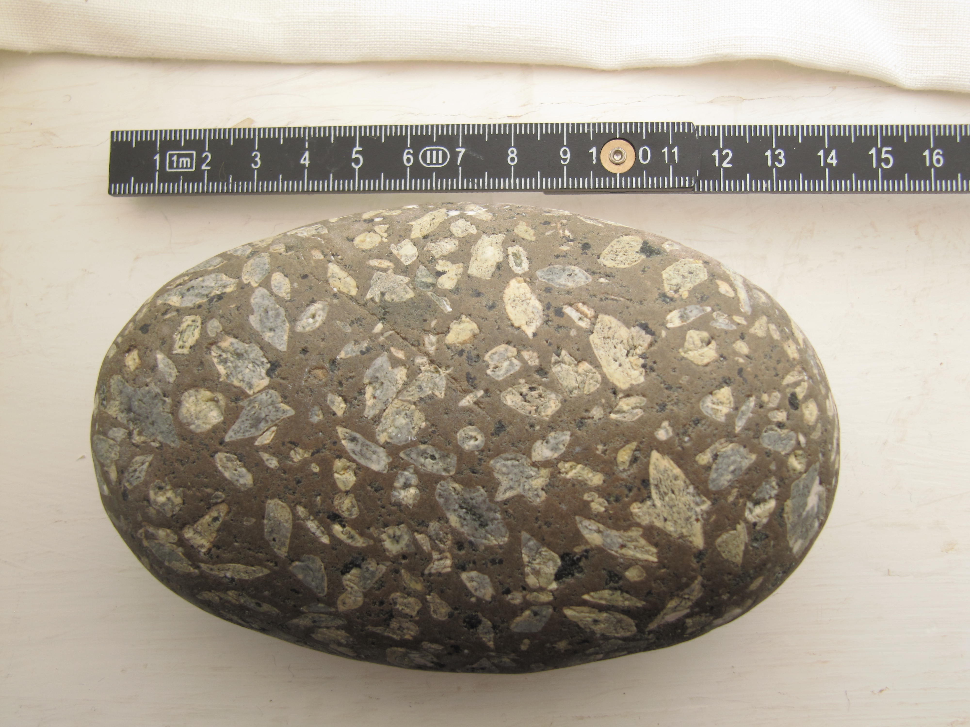 Velafrundet strandsten af rombeporfyr